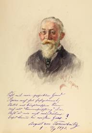 Porträts des August Ernst Otto Jobst von Tschirschnitz (1829–1916) gezeichnet von Anton Josef Pepino (1863-1921) im Gästebuch Schloss Neubeuern Band II. Text von August von Tschirschnitz: "Seht mit geschickter Hand